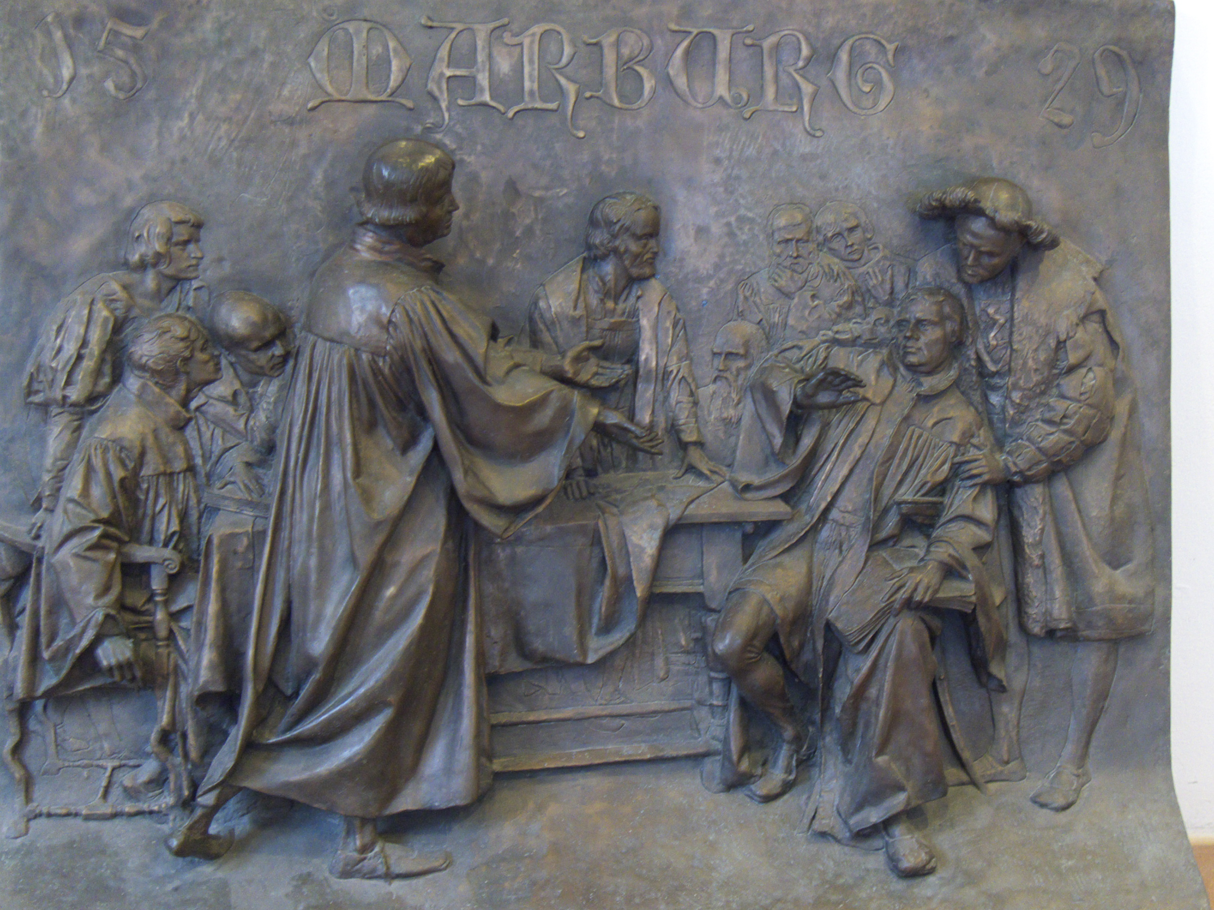 Relief zu den Religionsgesprächen 1529 im Schloss